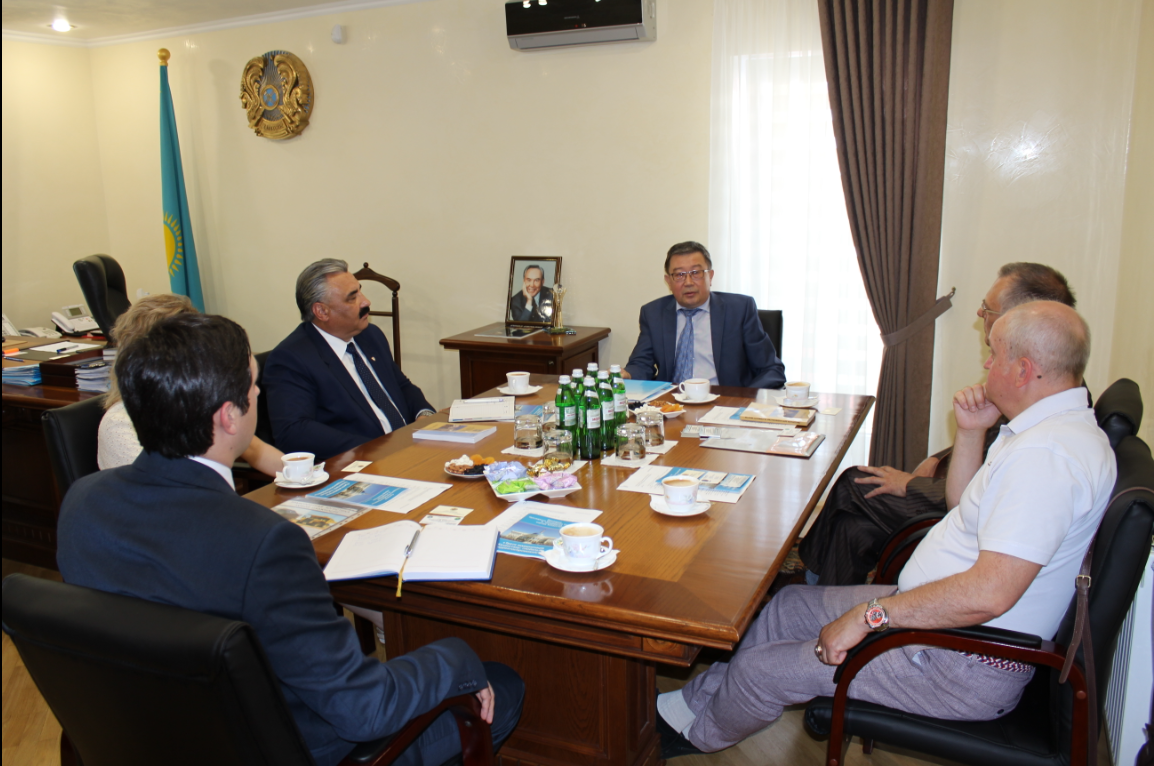 Фото під час зустрічі Посла Казахстану з активом Міждержінститу ім. Нурсултана Назарбаєва